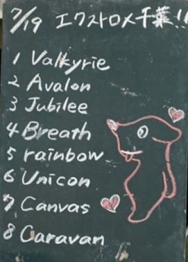 amiinAセトリボード